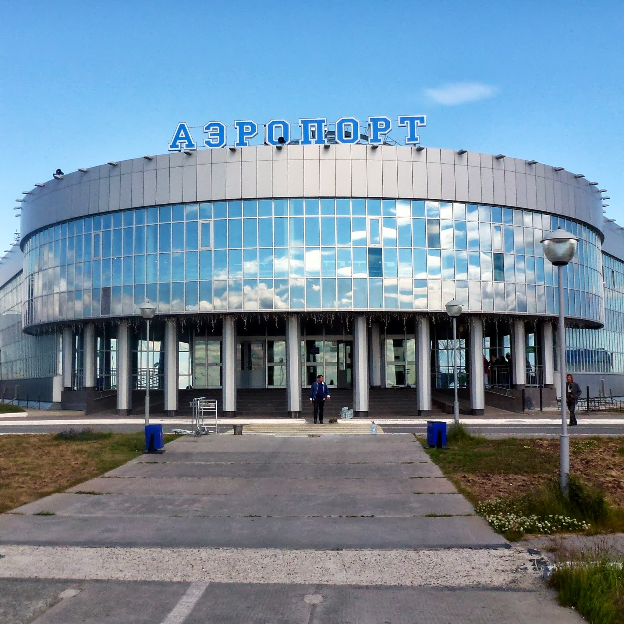 Салехард, аэропорт